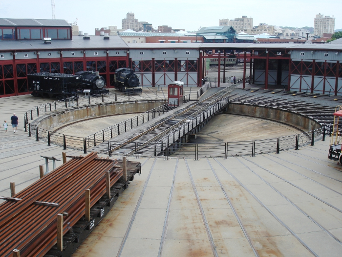 Steamtown, Eisenbahnmuseum in Scranton, Pennsylvania